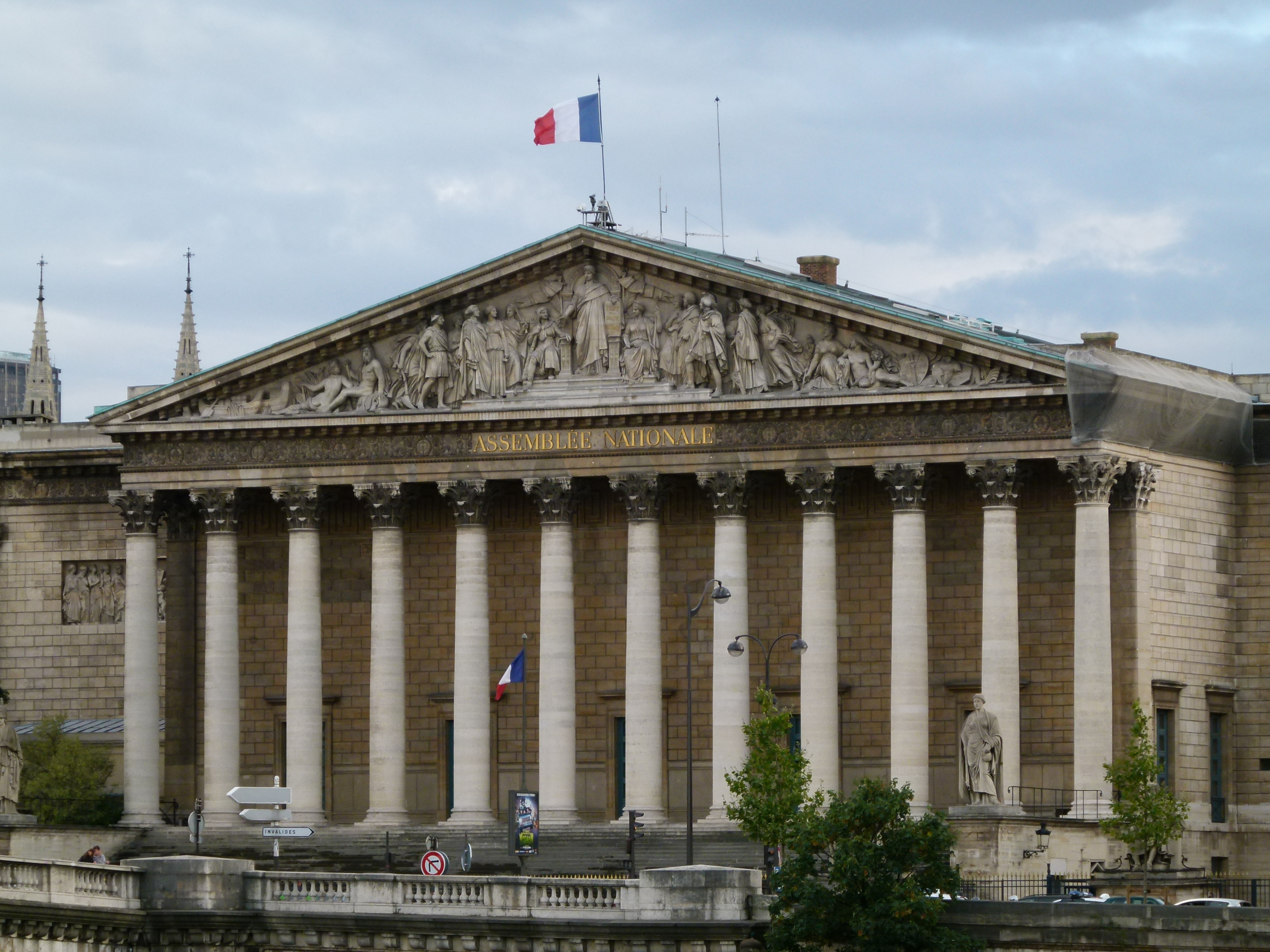 Chambre des Députés